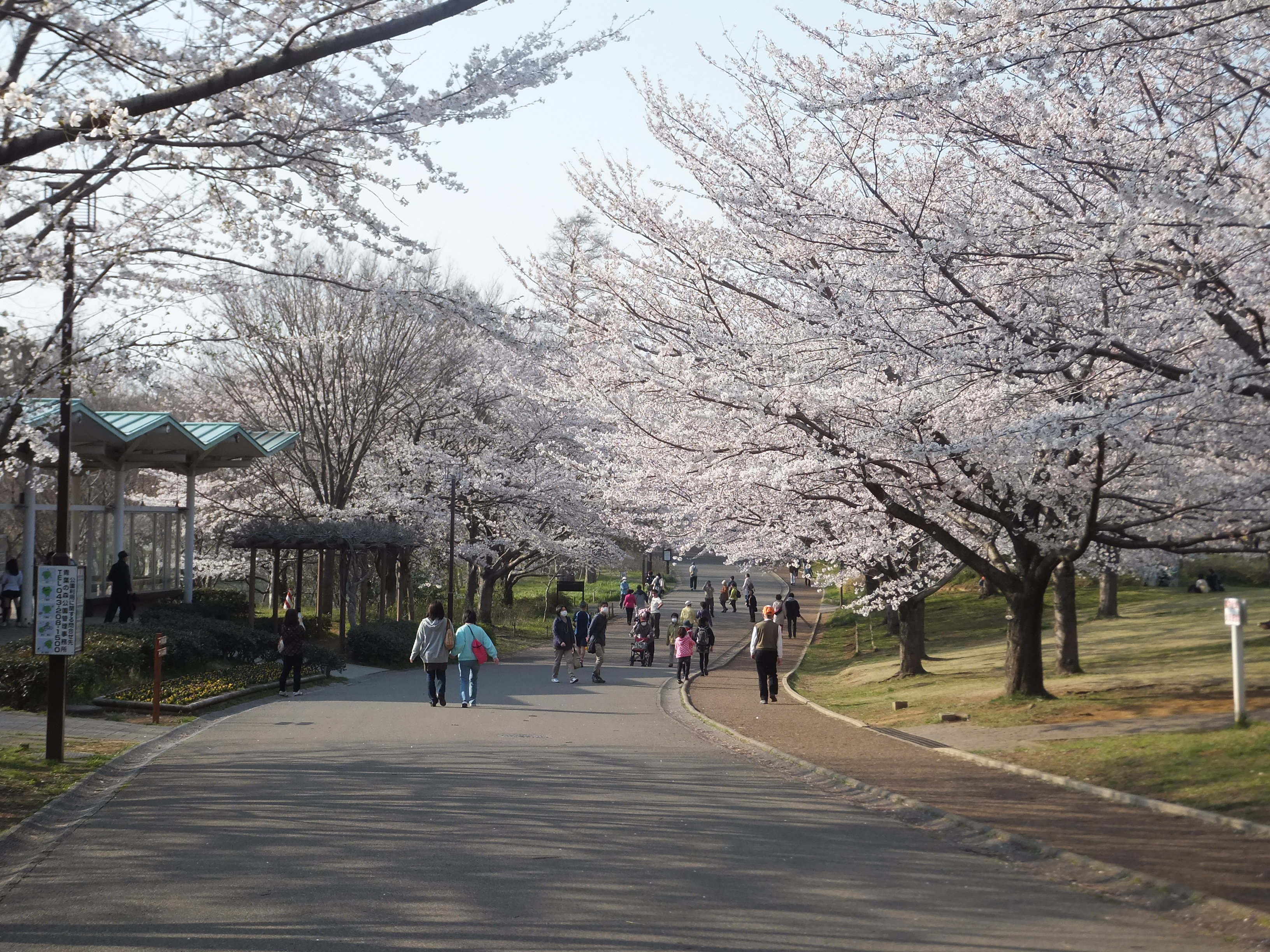 千葉県立青葉の森公園（千葉市中央区）